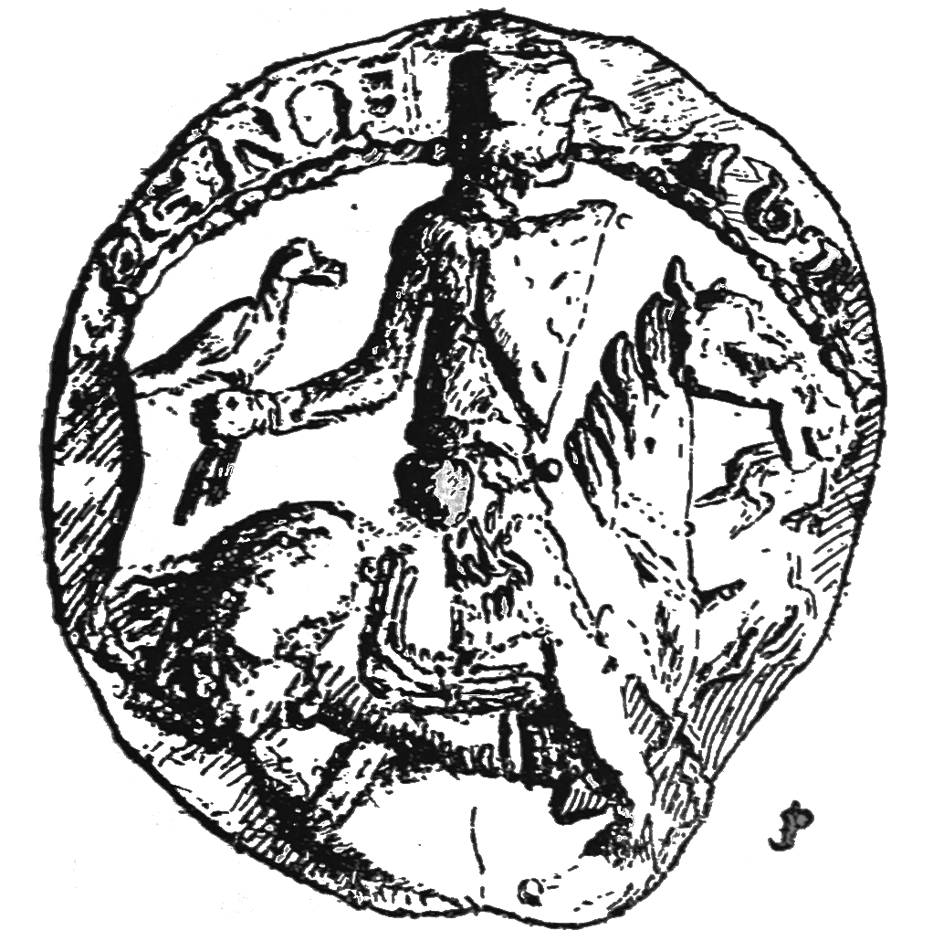 image de son sceau.